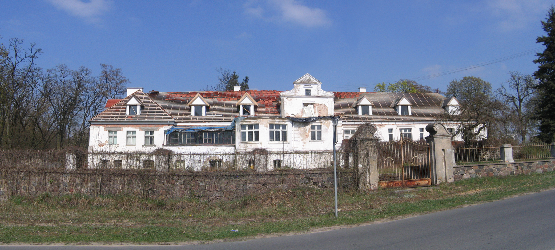 Dwór, Wronczyn